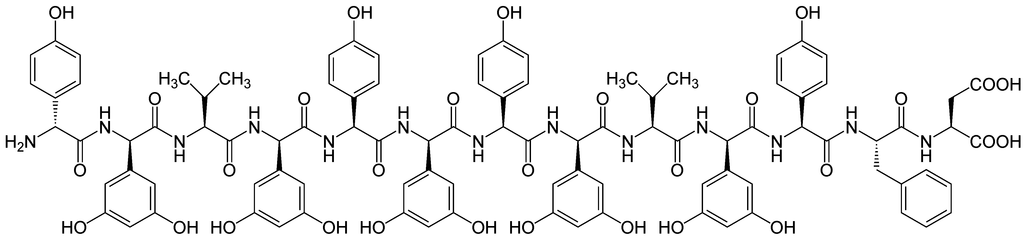 Feglymycin